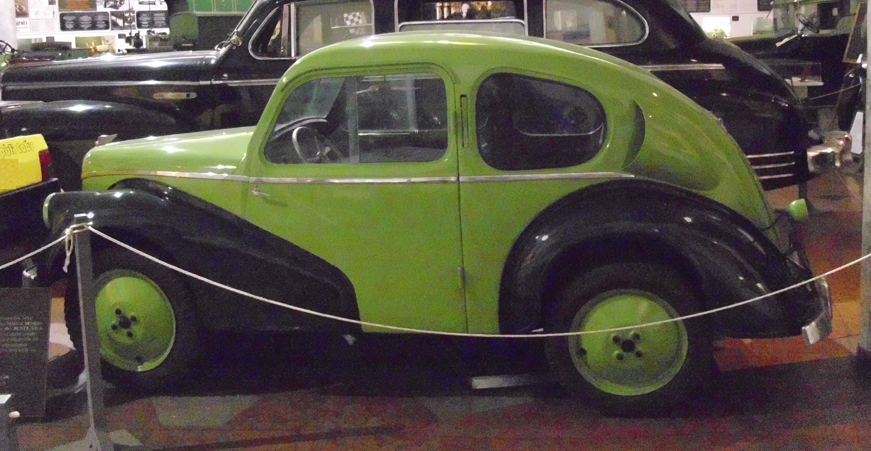 Pente 600 1948 im Transportmuseum Budapest